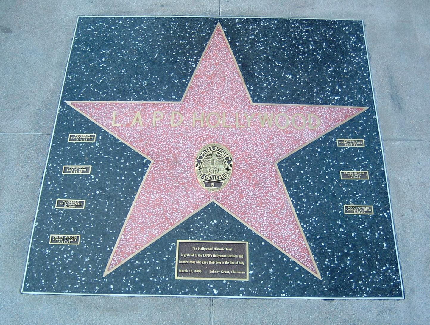 Fotografie: 12.3.2006 (Berthold Probst) Eigen fotografiert, für freie Verwendung freigegeben